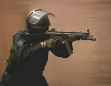 2002年5月10日に公開されたSAT訓練映像からの写真。このMP5にはシュアファイアM628ウェポンライトを装着している。